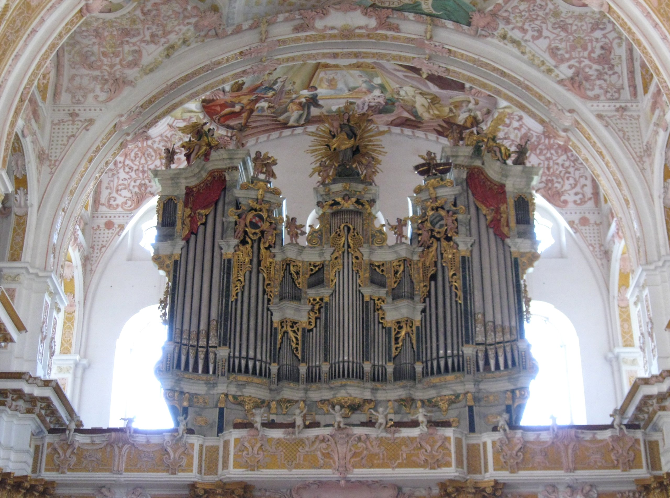 Orgel, Klosterkirche St. Mariä Himmelfahrt, Kloster Fürstenfeld, Fürstenfeldbruck